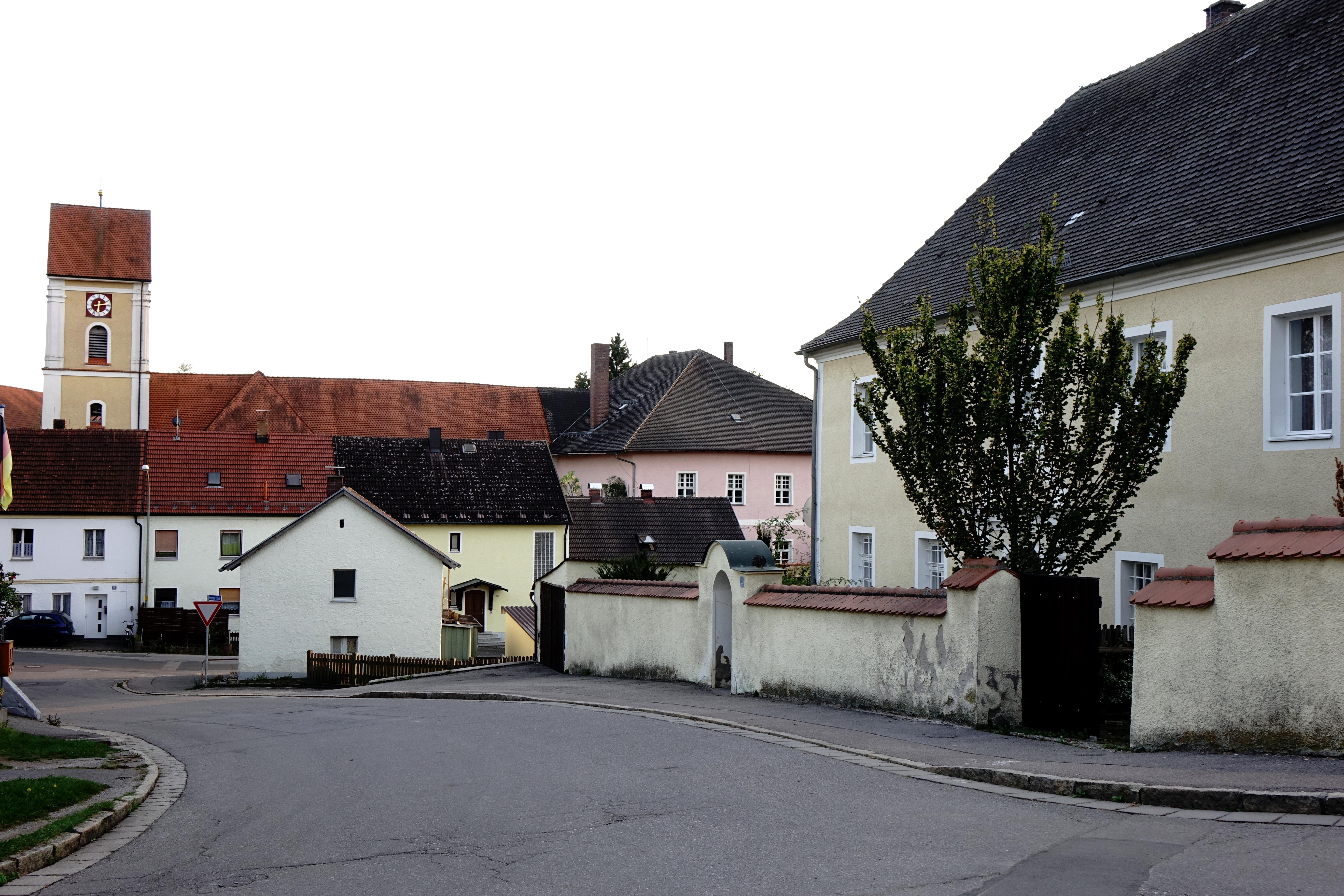 Rechts der alte Pfarrhof, links Kirche St. Jacobus, rechts davon ein Teil des SchlossesThis is a photograph of an architectural monument.